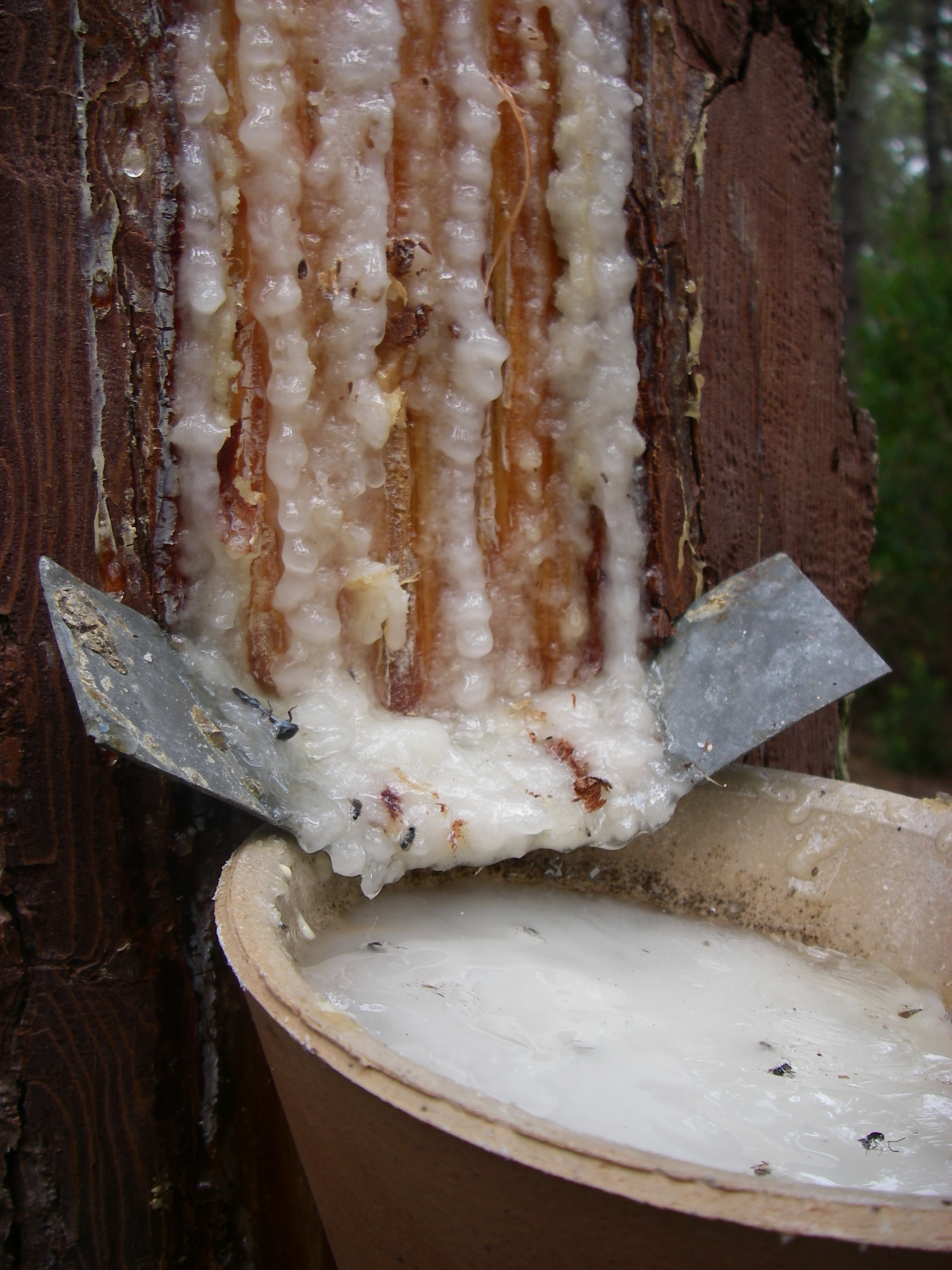 Pot de résine sur un pin gemmé (La Teste de Buch, Gironde, Aquitaine, France)